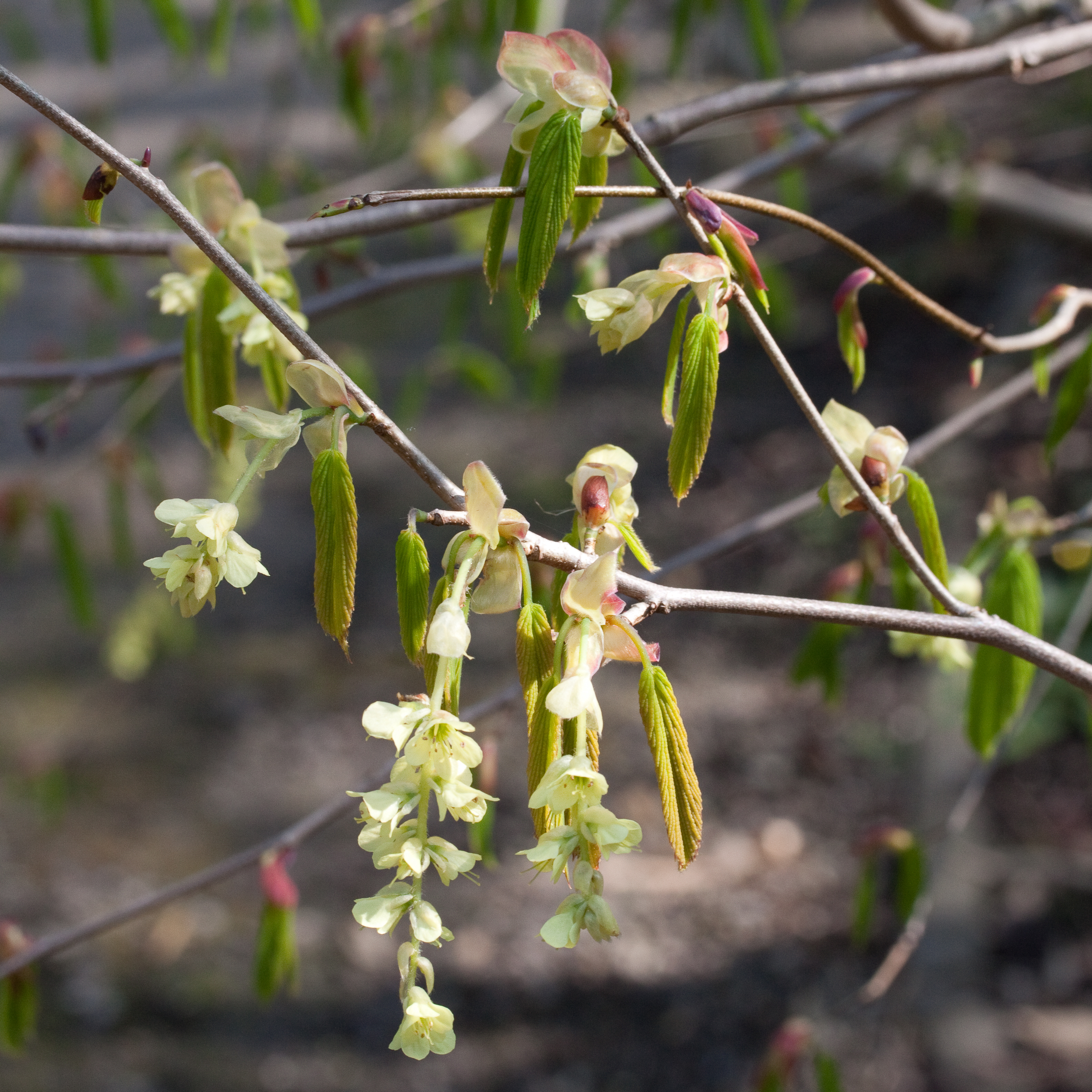 Fleurs de Corylopsis willmottiae - Jardin botanique de Strasbourg - France